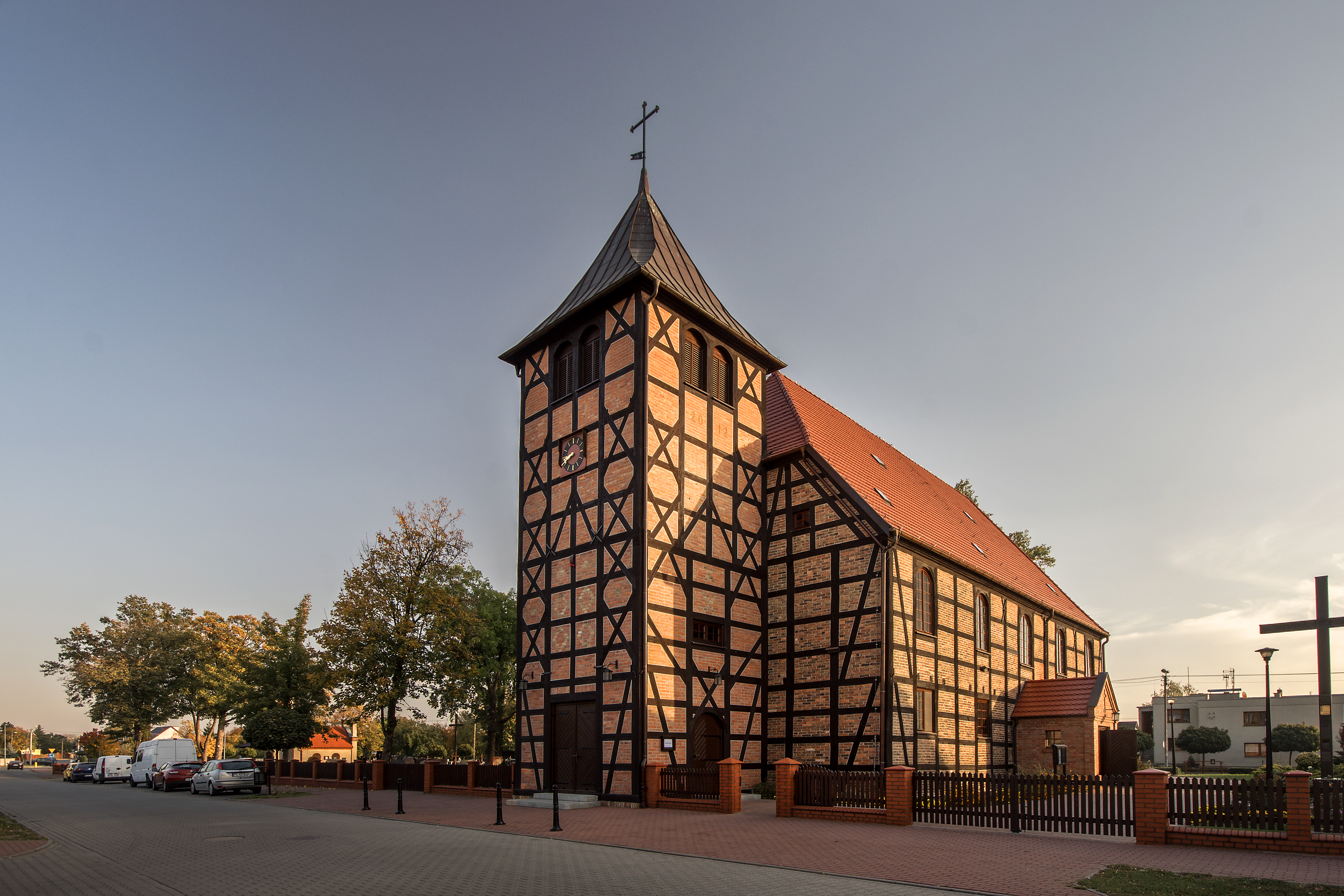 Leszno, Kościół Najświętszej Maryi Panny Wniebowziętej w Lesznie